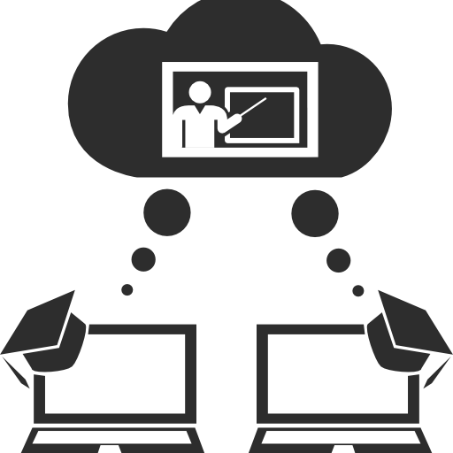 Transaksiyonel(etkileşimsel) Uzaklık